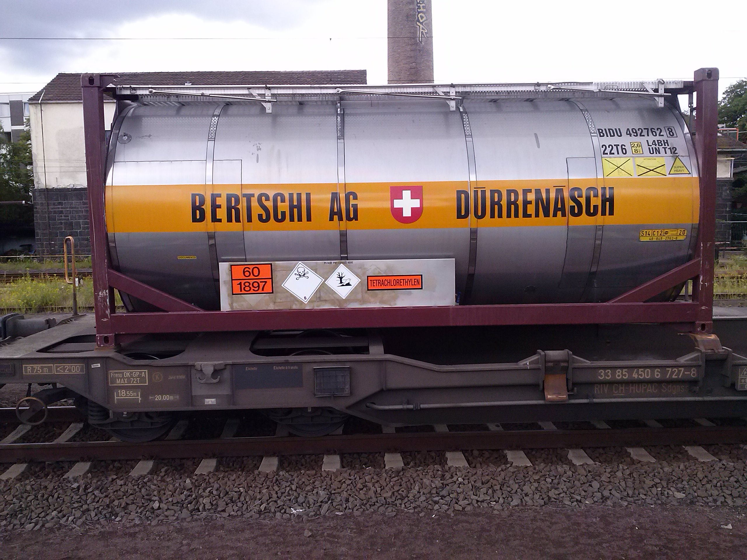 Tankcontainer mit Tetrachlorethylen (=Perchlorethylen) im Darmstädter Hauptbahnhof